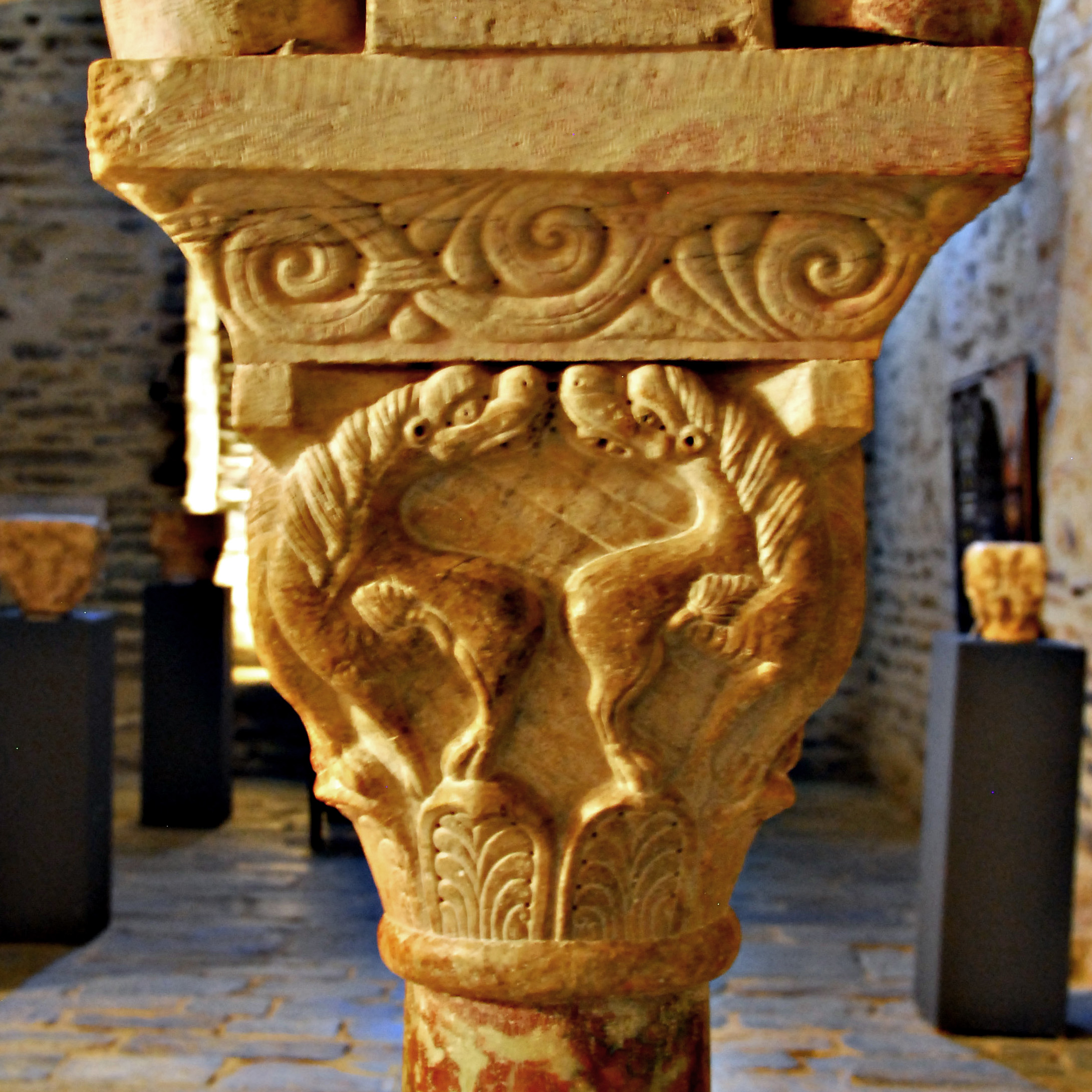 Serrabone, Empore, Kapitell Nr 7